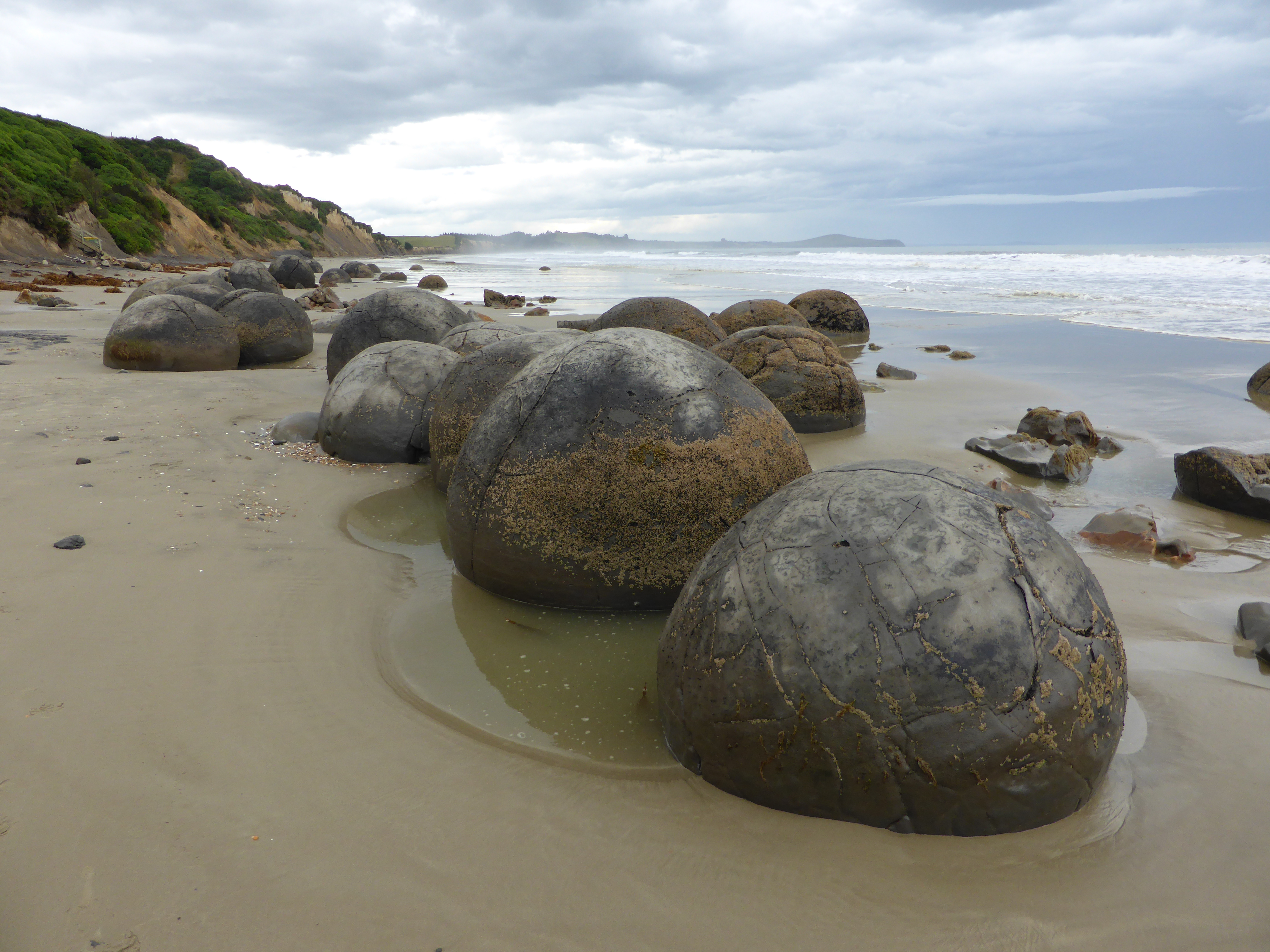 Moeraki Bolders